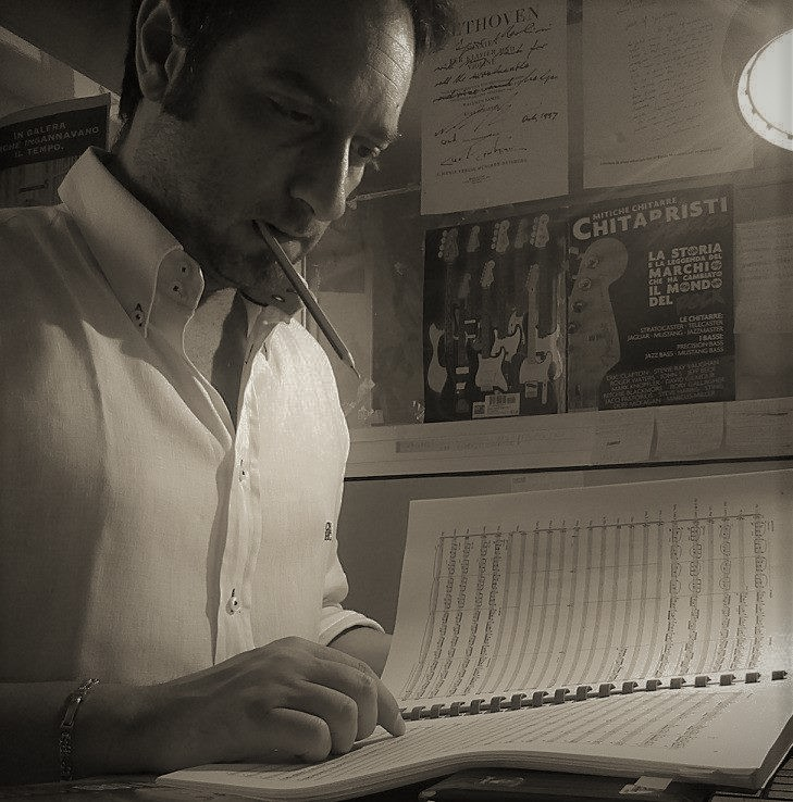 igor merlini studia una partitura